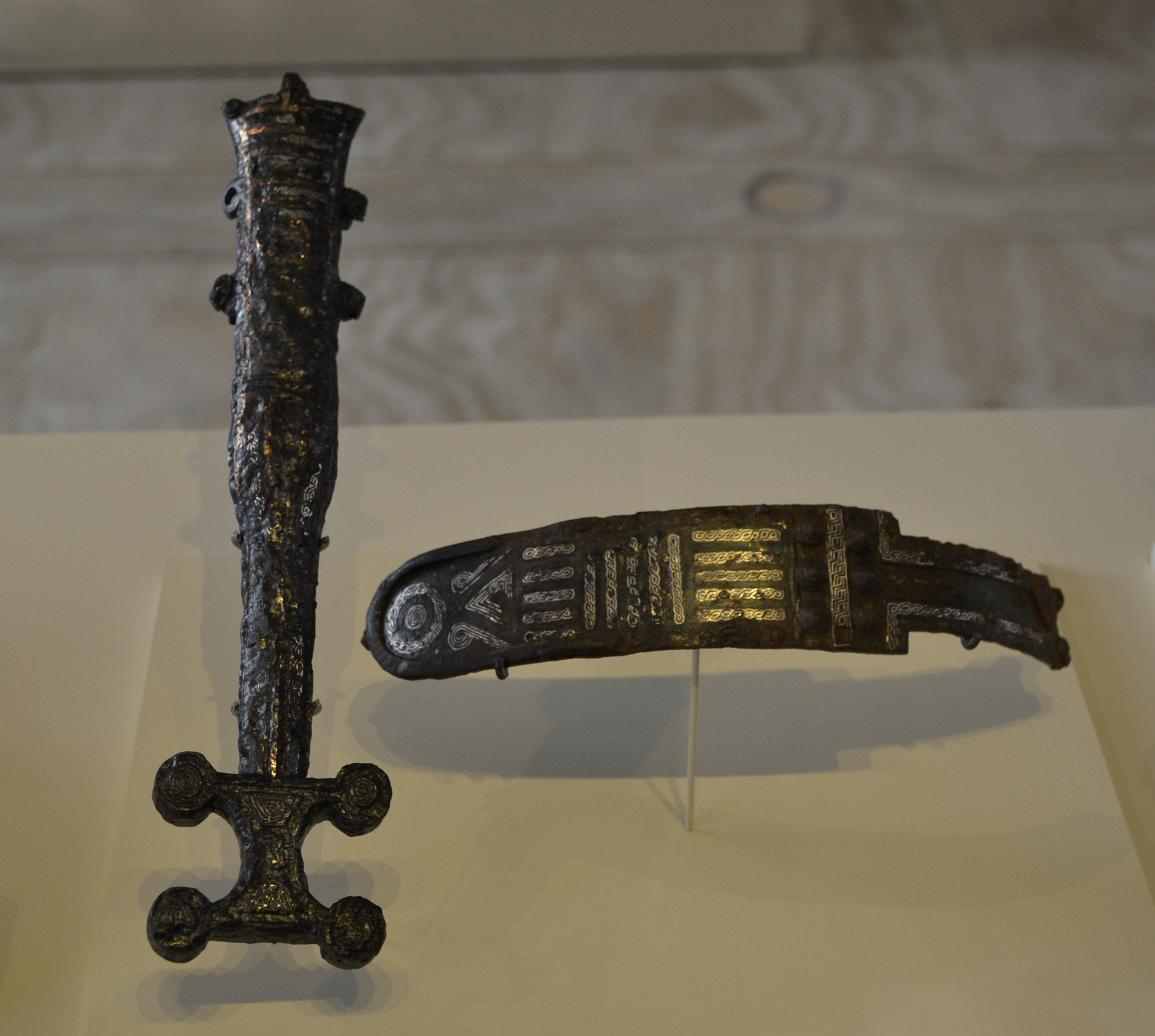 Contera de vaina y tahalí de espada vetona. Siglo IV-III. a. C. Museo Arqueológico Nacional de España. Vaina de puñal tipo Monte Bernorio-Miraveche, formada por un armazón de hierro con un estrangulamiento inferior donde va embutida la hoja del puñal. En la parte superior la embocadura se ensancha ligeramente y presenta remaches laterales. En la parte inferior la contera es tetralobular, con cuatro discos circulares unidos entre sí. Conserva decoración damasquinada dorada, en cobre, y posible damasquinado en plata muy perdido, en su tercio superior, embocadura, y en la contera. Durante la excavación de la sepultura no se halló el puñal que iría en su interior. Tipología: Monte Bernorio-Miraveche. Quesada III. Procedencia: Necrópolis de La Osera (Chamartín, Ávila). Técnica: Hierro, plata y cobre, damasquinado. Longitud:28 cm; grosor: 0,30 cm; anchura máxima: 4,60 cm. Contera de vaina: Anchura máxima: 6,40 cm. Nº inv. 1986/81/II/201/2. Tahali formado por un armazón laminar curvado de hierro decorado con una lámina central de bronce que a su vez está decorada mediante damasquinado de plata formando trenzados. Tipología: Tahalí de tipo Monte Bernorio-Miraveche. Quesada III. Procedencia: Necrópolis de La Osera (Chamartín, Ávila). Materia: Hierro forjado, plata y bronce. Técnica: Damasquinado, forjado, embutido. Longitud: 21,50 cm; grosor: 0,30 cm; anchura máxima :4,30 cm